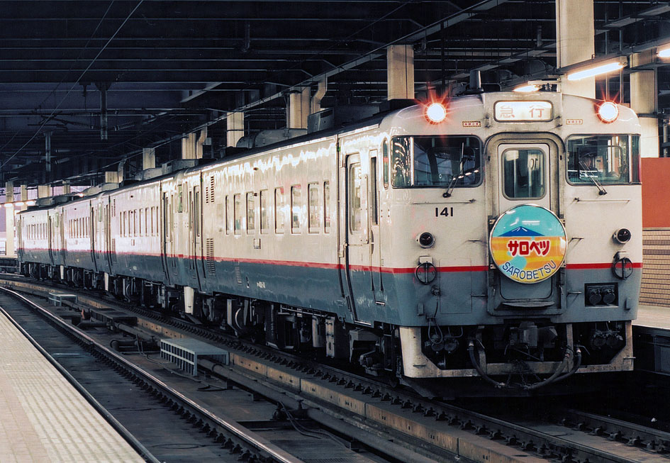 JR北海道 キハ400-141 急行「サロベツ」